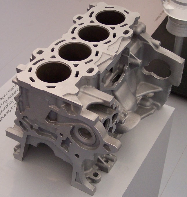 Motorblock eines 4-Zylinder Reihenmotors Wassergekühlt Aluminium, Blick auf die Geräteseite, eigene Aufnahme, GFDL